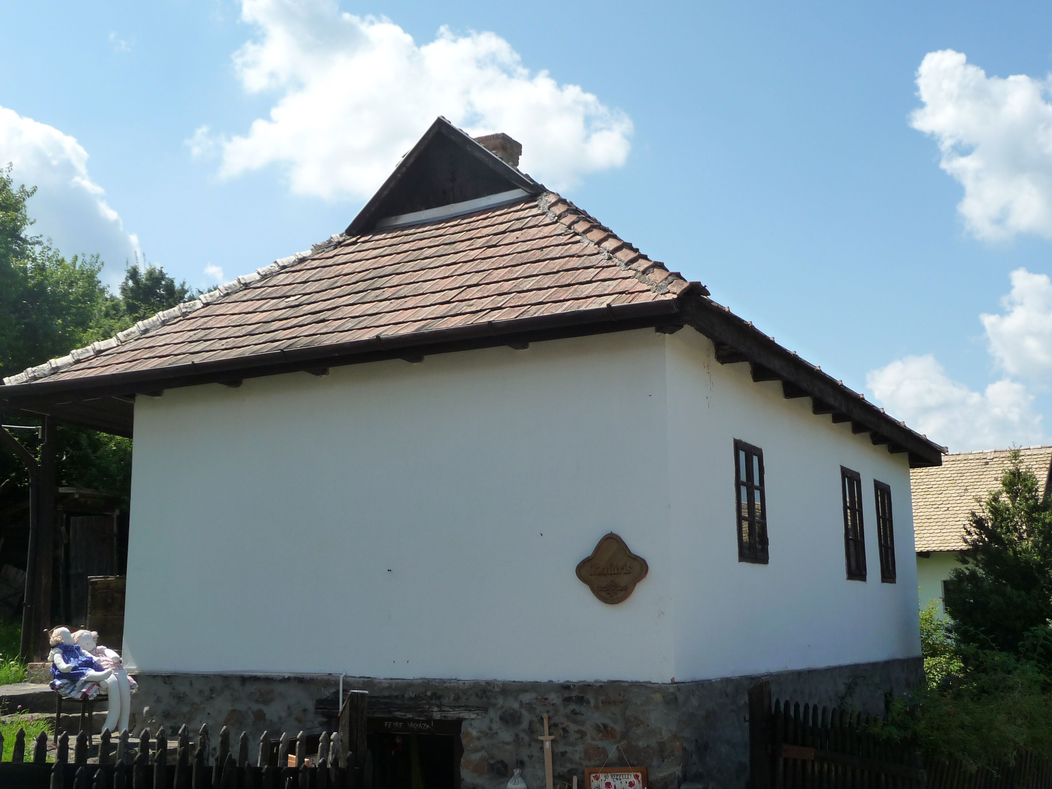 Hollókő, Kossuth L. út 66.